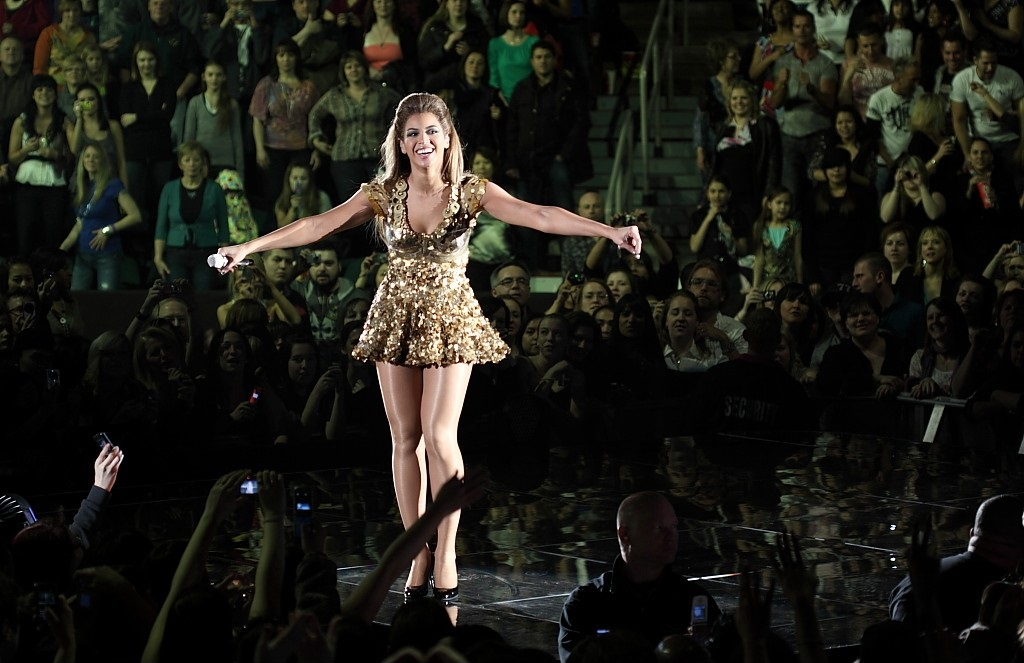 Artista Beyoncé cantando durante un concierto